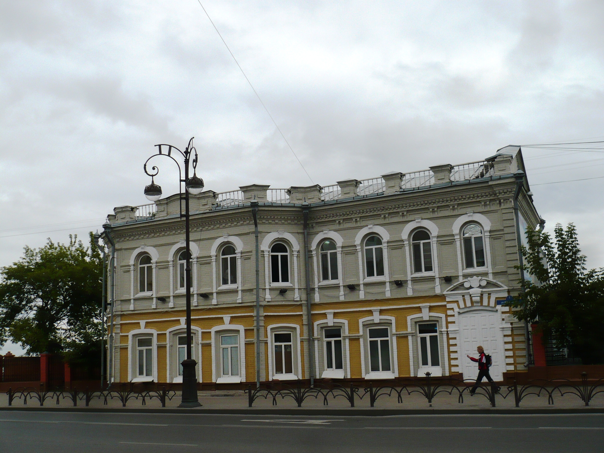 по Тюмени